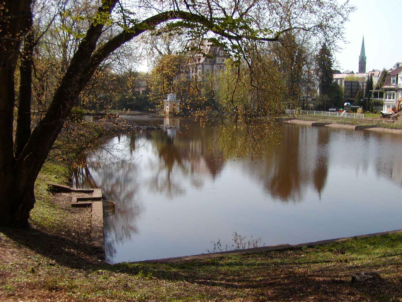 Der Schwanenteich in Minden, Nordrhein-Westfalen. Der Schwanenteich entstand mittels eines Wehres, das die Bastau aufstaut, die kurz nach passieren des Teiches in die Weser mündet. Im Hintergrund der Kirchturm der Simeonskirche (St. Simeon).